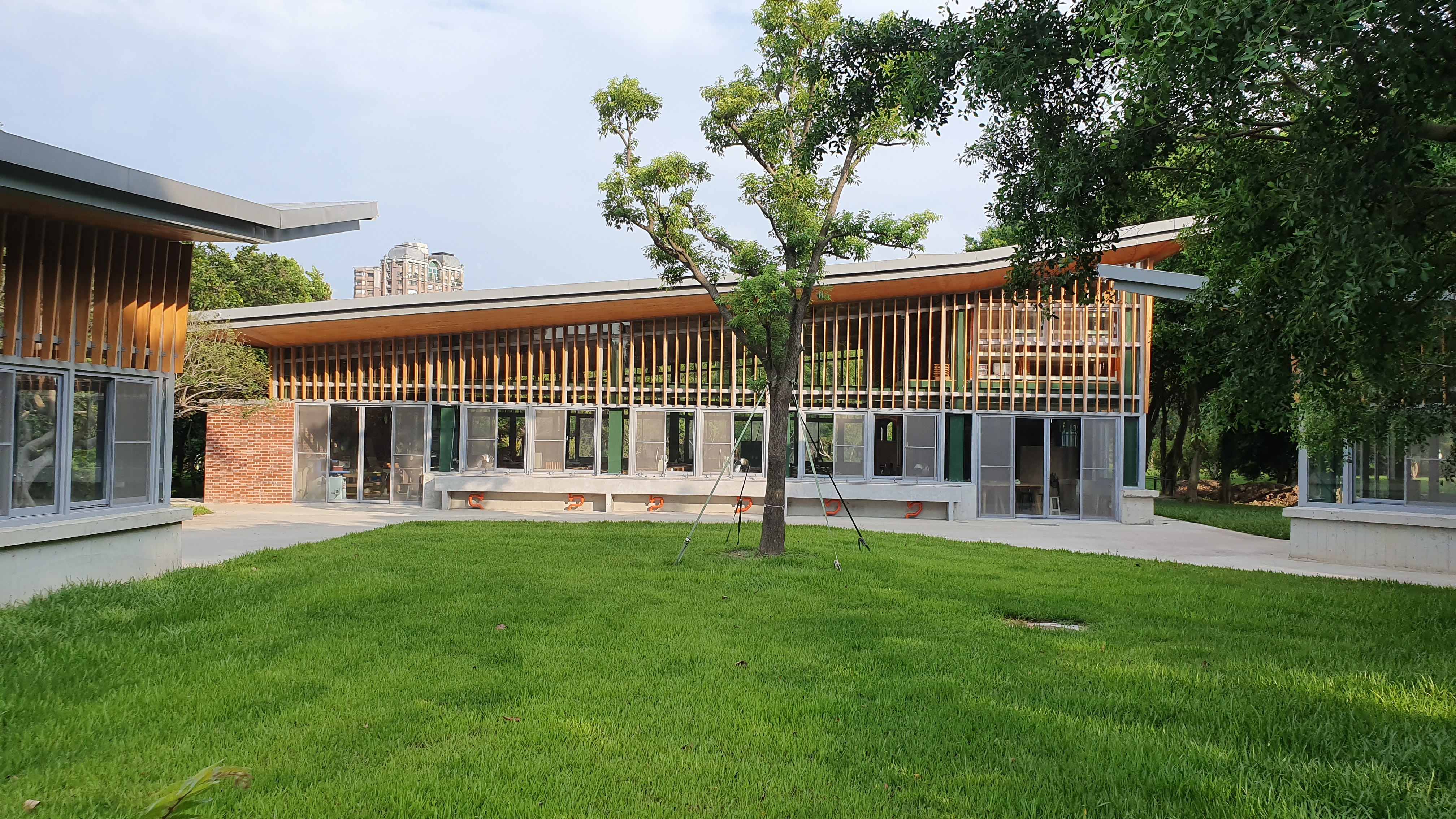 中文（台灣）: 國立臺北大學懷德居文化基金會木藝教室。